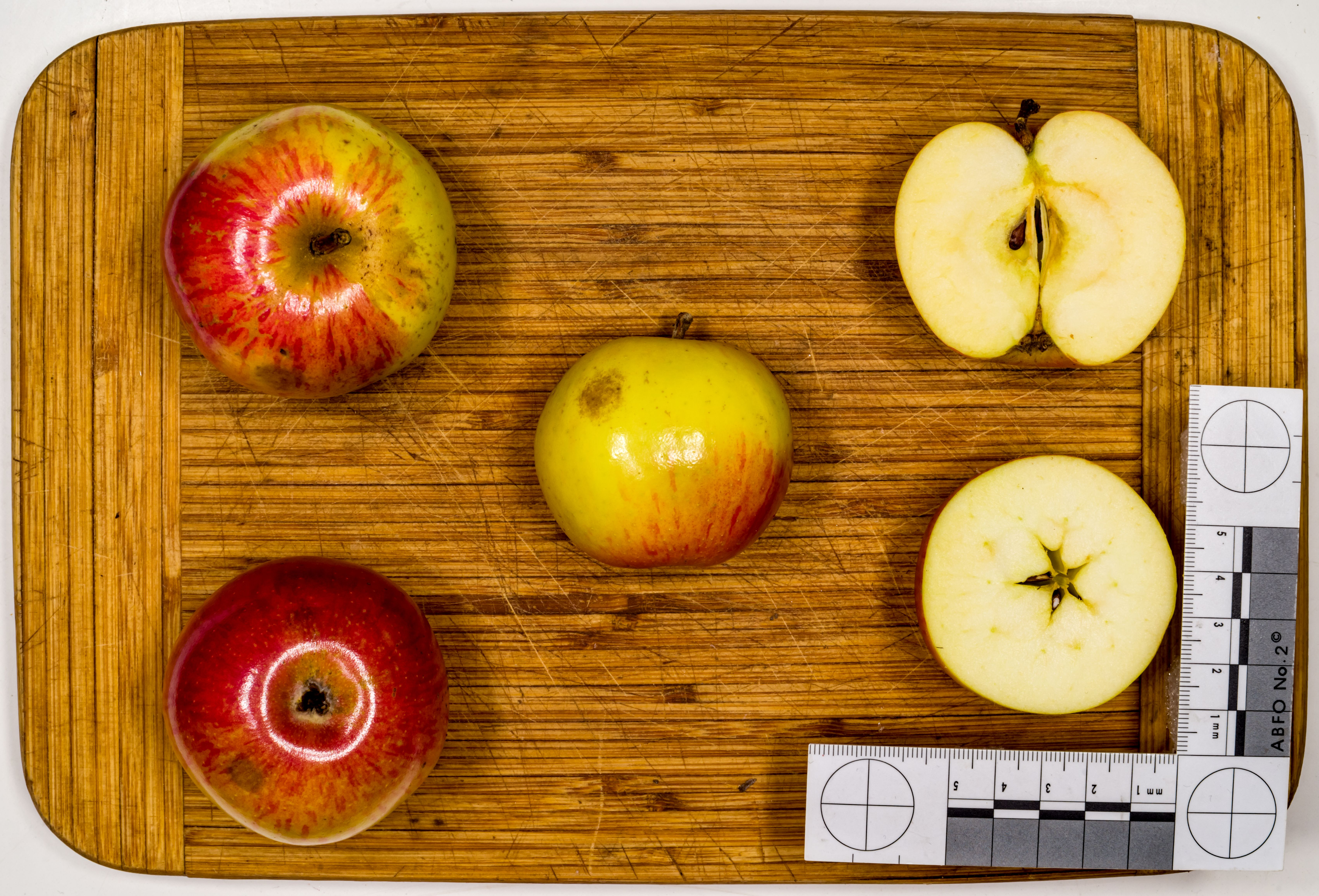 Apfelsorte: Großer Rheinischer Bohnapfel oder nur Rheinischer Bohnapfel, Zufallsämling